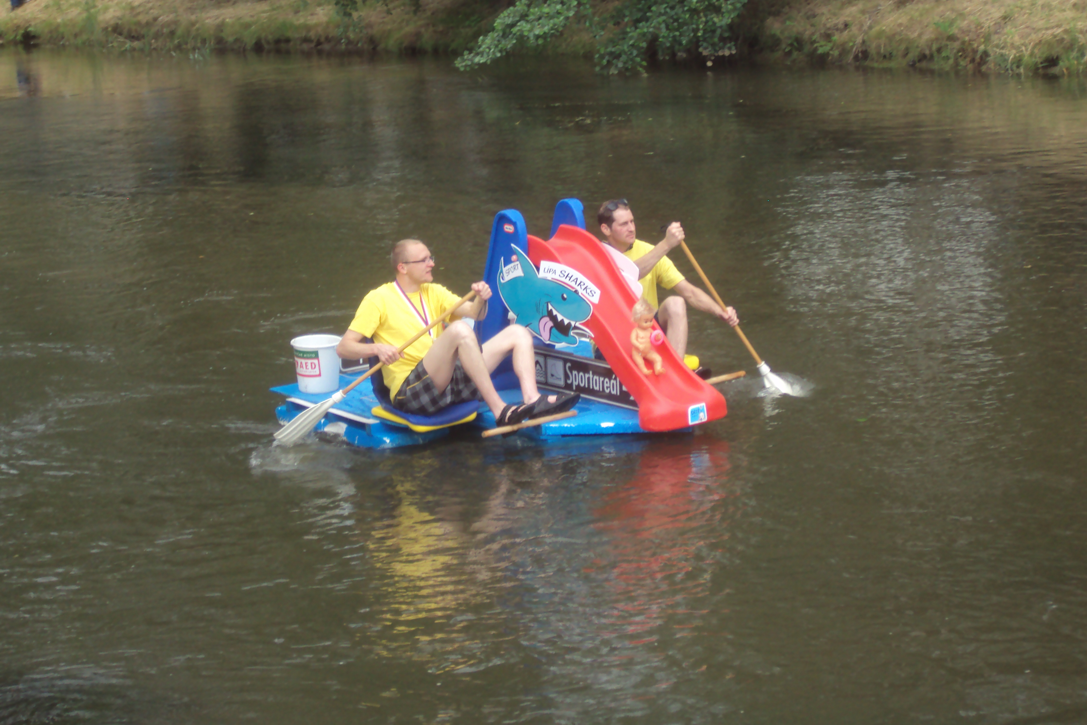 Plavidlo v akci